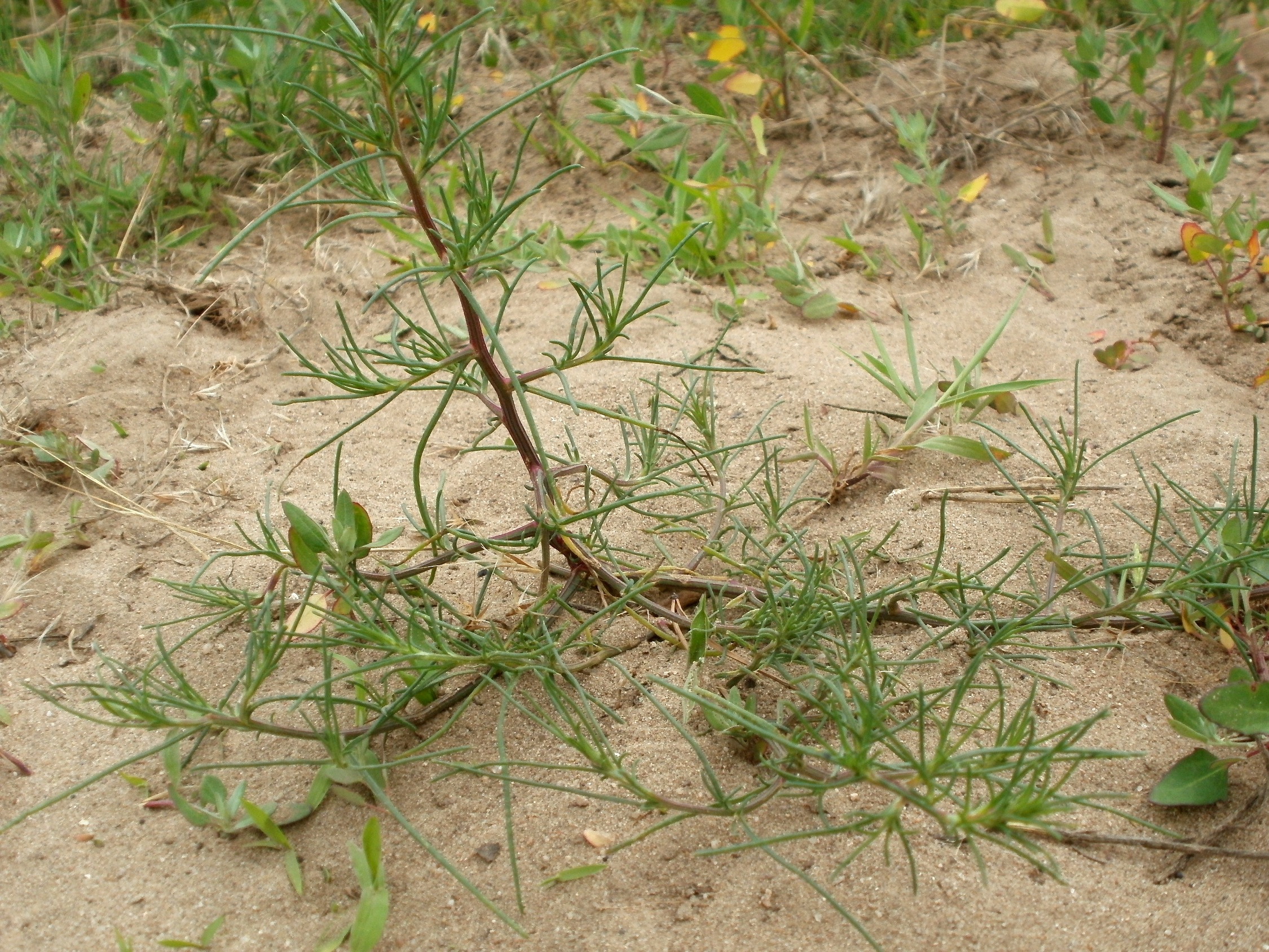 Ruthenisches Salzkraut (Salsola tragus) auf der Friedenshöhe an den Oftersheimer Dünen